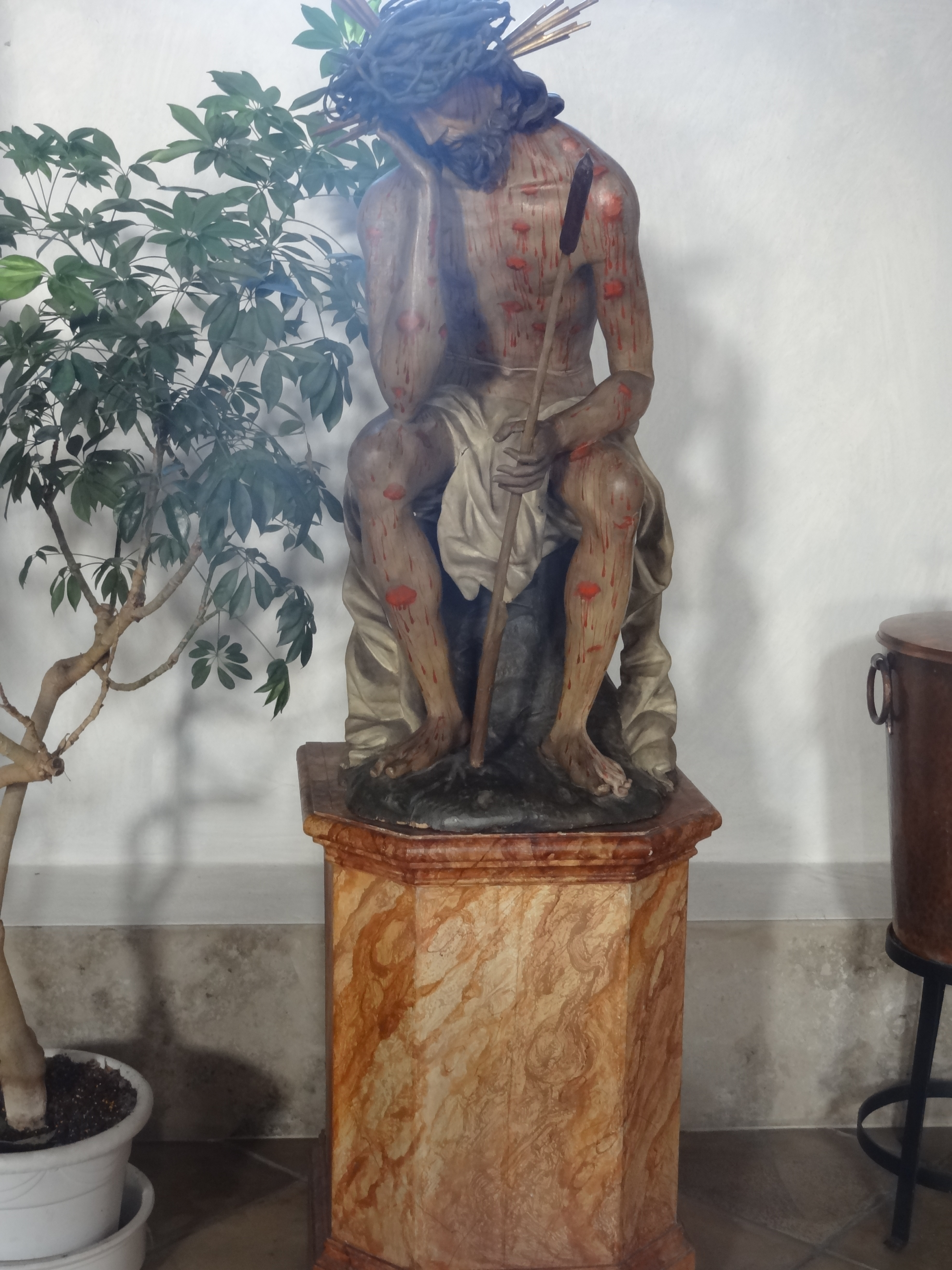 Spätgotische Schnitzfigur Christus in der Rast aus der Schule Hans Leinbergers